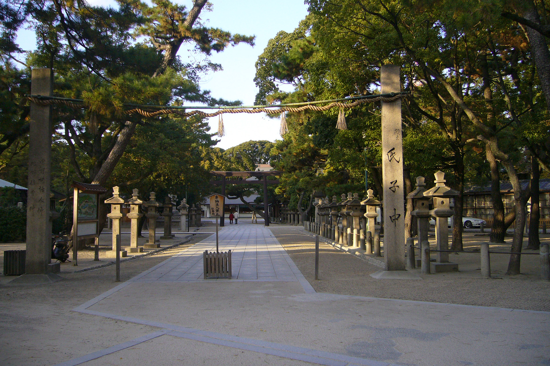 Nishinomiya-jinja in Nishinomiya, Japan